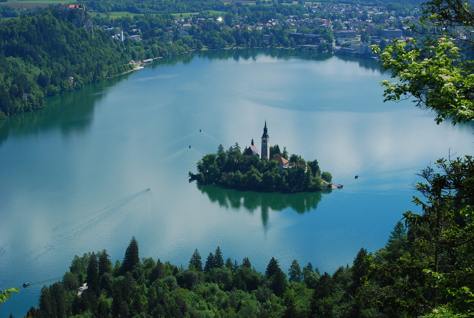 slovenia 2013